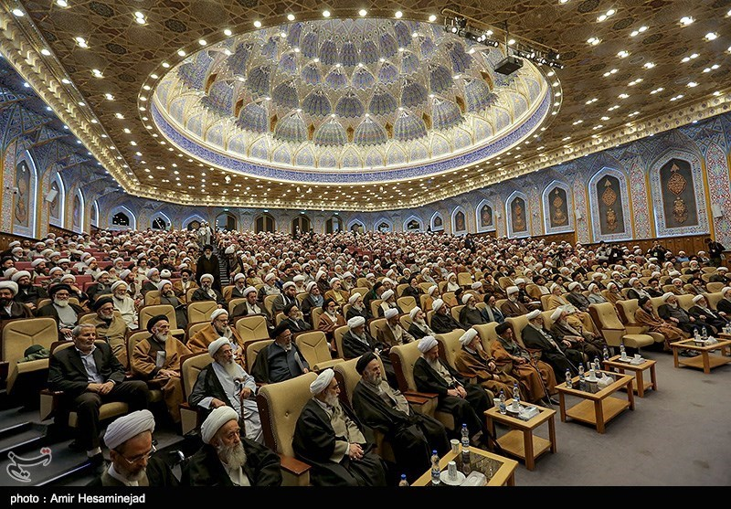 Hawza Qom Lecturers Annual Assembly - 2016